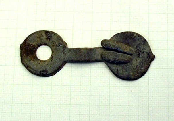 Rohling für eine Tuchplombe, Blei, Bremen, 19. Jahrhundert, Focke-Museum Bremen, Inv.Nr. 1978.306